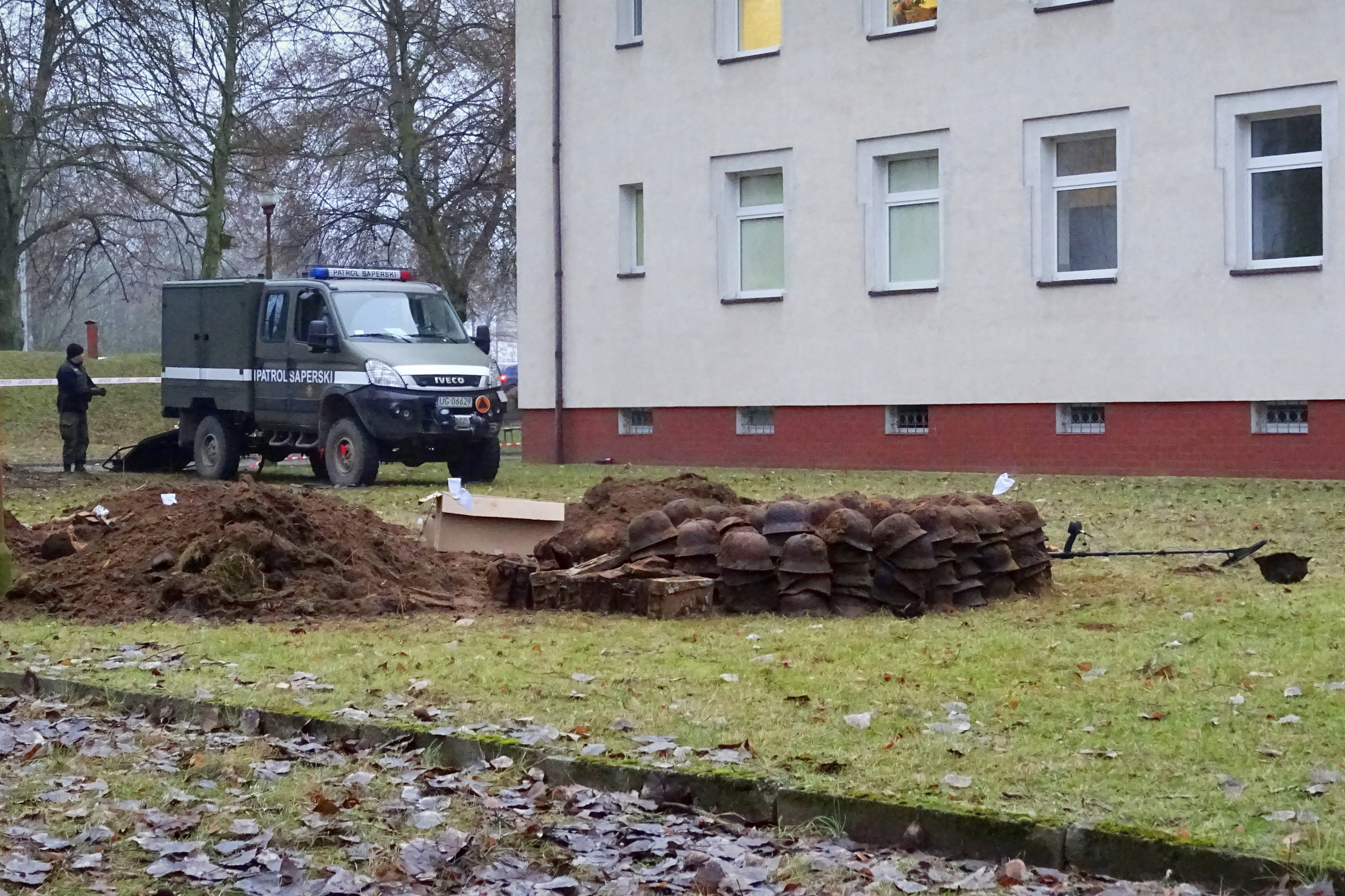 2 Stargardzki Batalion Saperów, patrol rozminowania nr 3, podczas interwencji w Gorzowie Wlkp. Saperzy korzystają z pojazdu saperskiego Topola-S na podwoziu Iveco Daily zbudowanego przez AMZ Kutno.